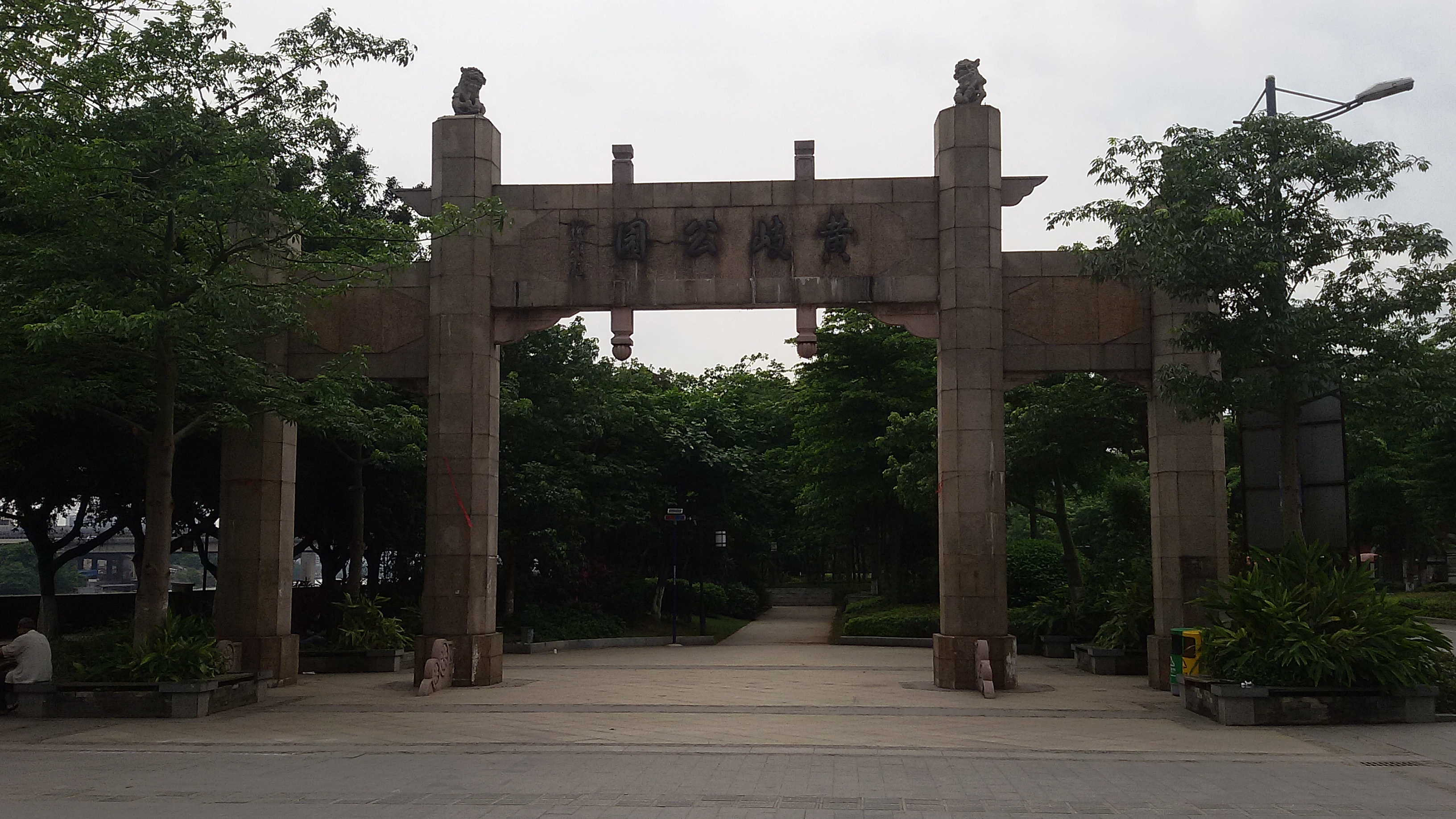 粵語: 黃岐公園嘅西牌坊